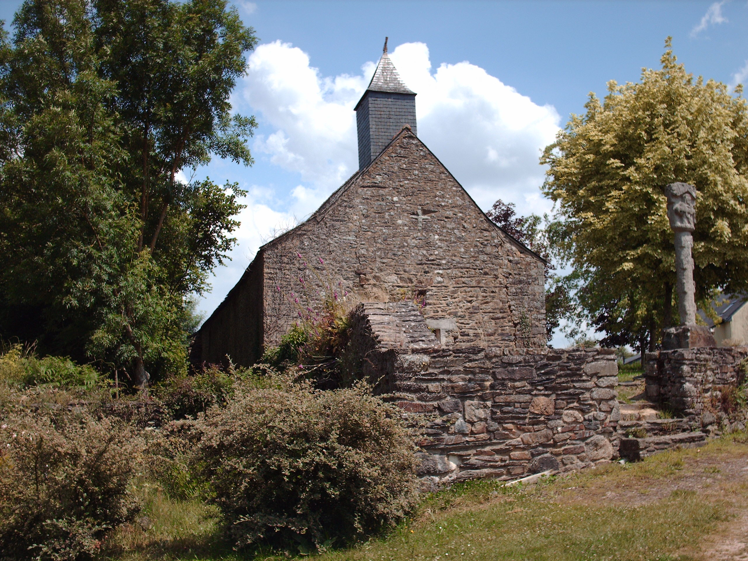 La chapelle Saint Nicolas avec la croix en granit classée MH